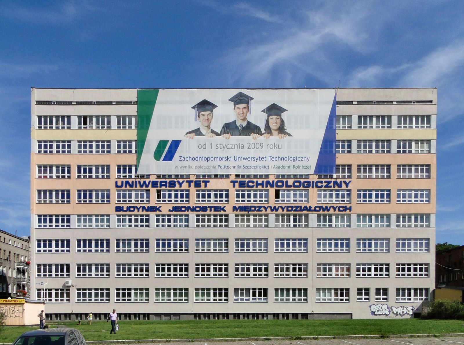 Zachodniopomorski Uniwersytet Technologiczny w Szczecinie - budynek międzywydziałowy